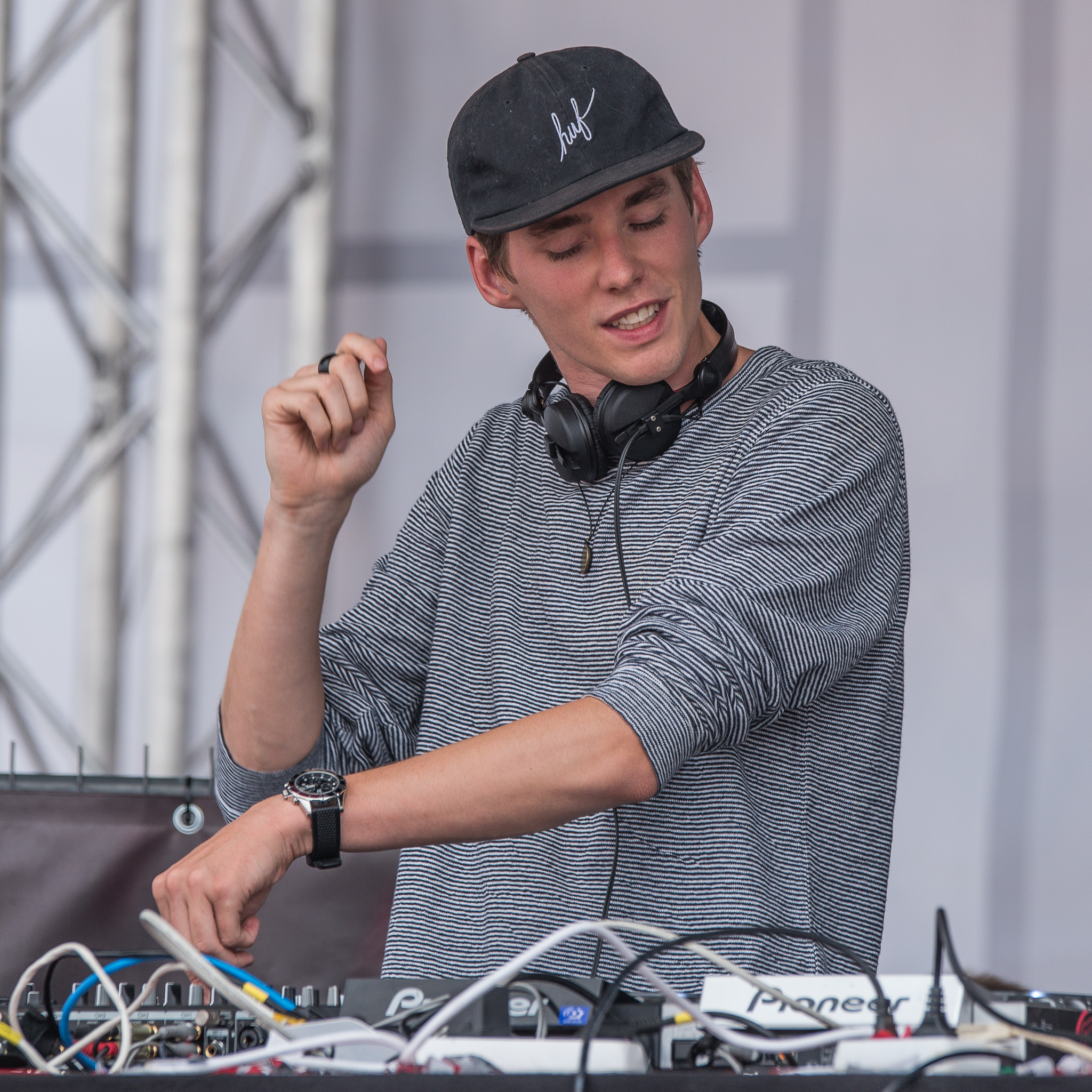 Festival,Konzert,Livekonzert,Livemusik,Lost Frequencies,Mainstage,Musik,Open Beatz 2016